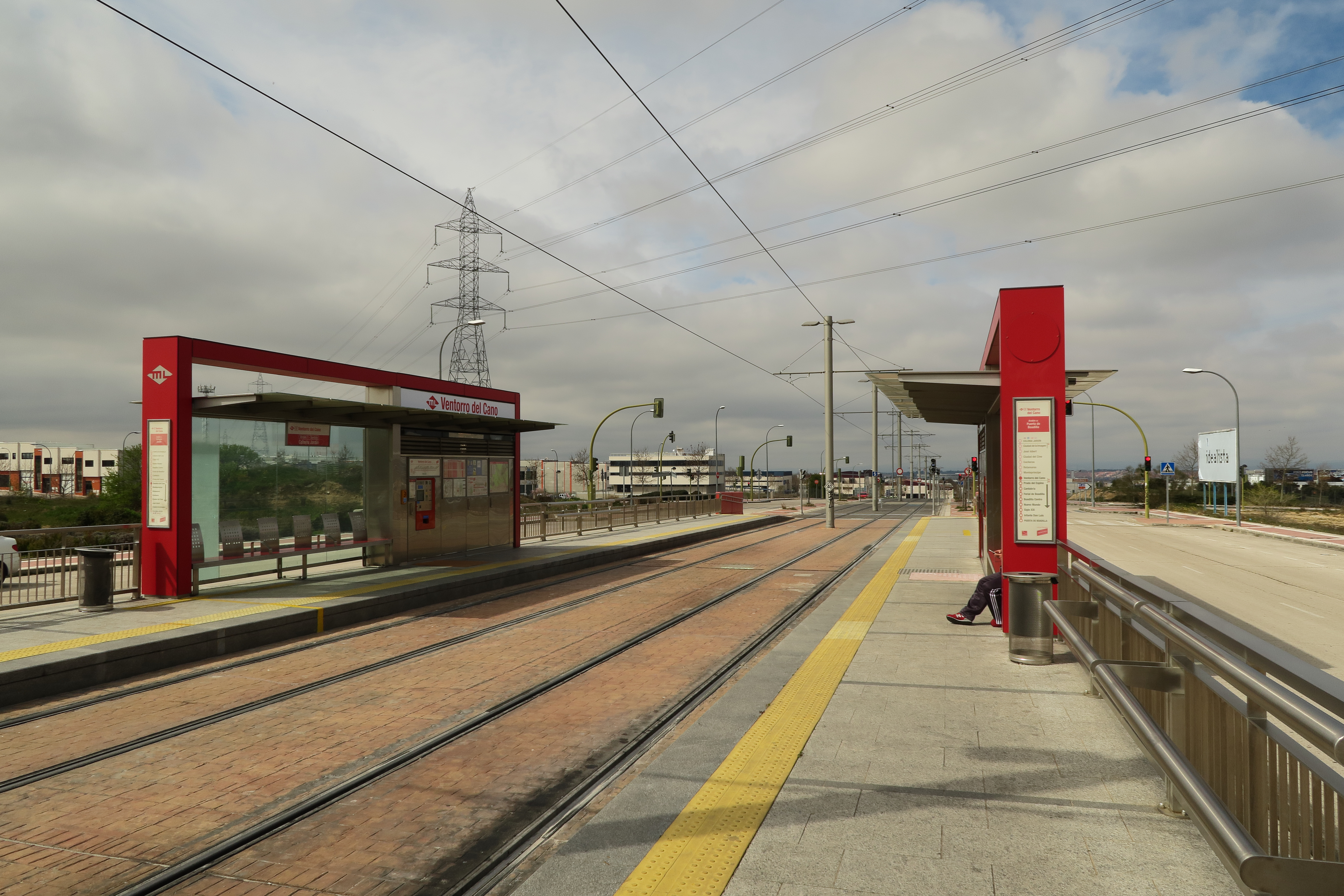 Estación de Ventorro del Cano